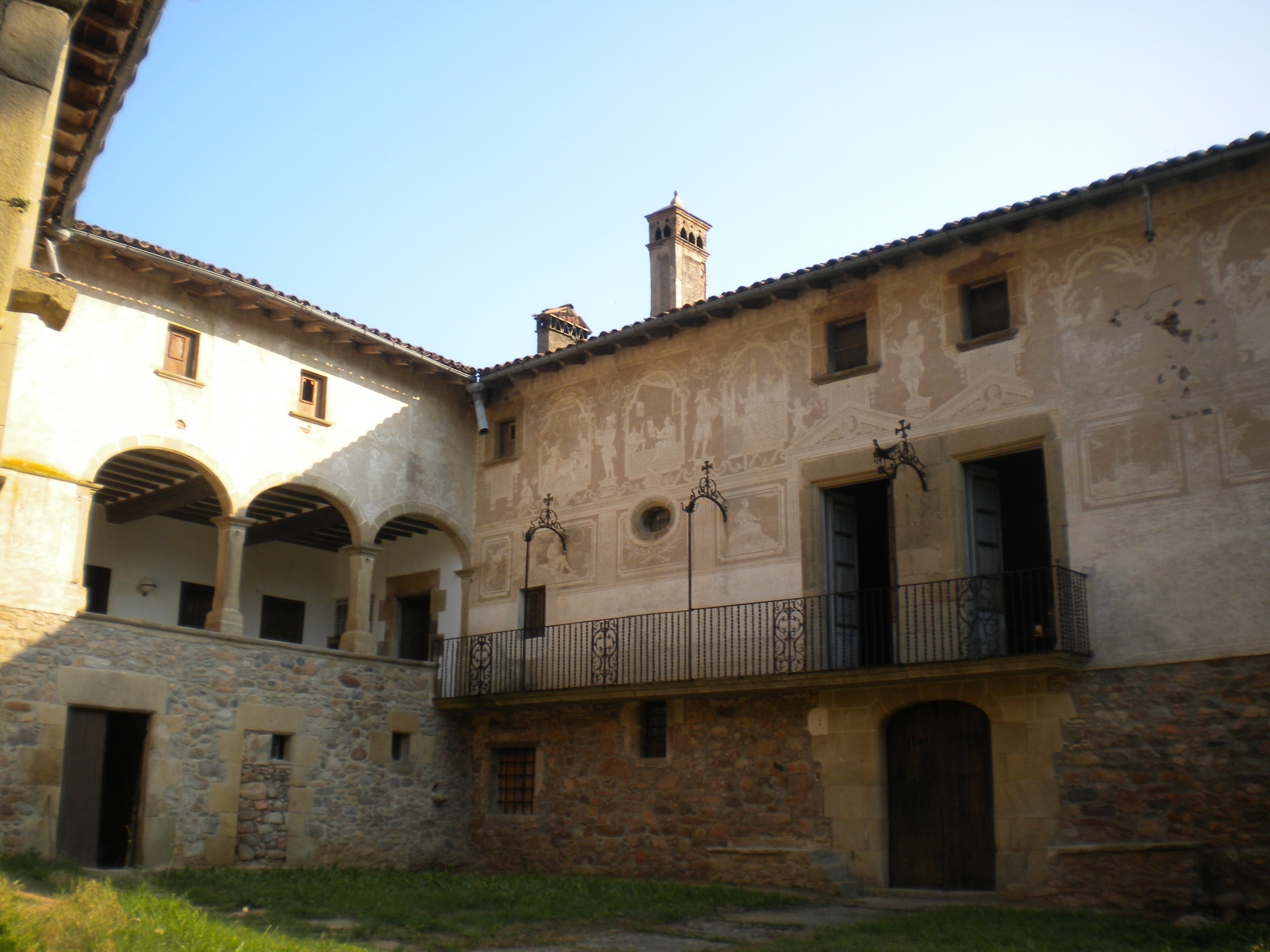 Façana esgrafiada i balconades de la Masia Masferrer, al municipi de Sant Sadurní d'Osomort, Osona.